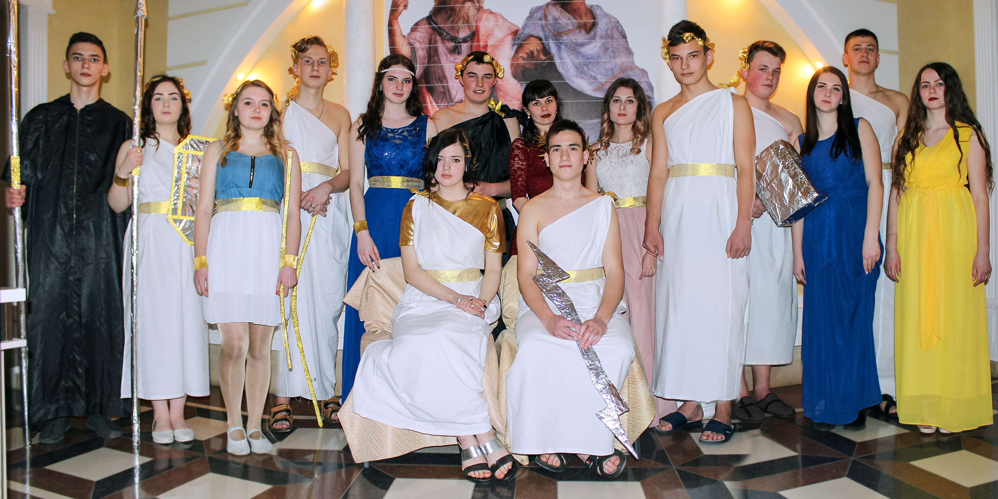 Студенти-учасники театральної студії у ролі грецьких богів - березень 2018 року